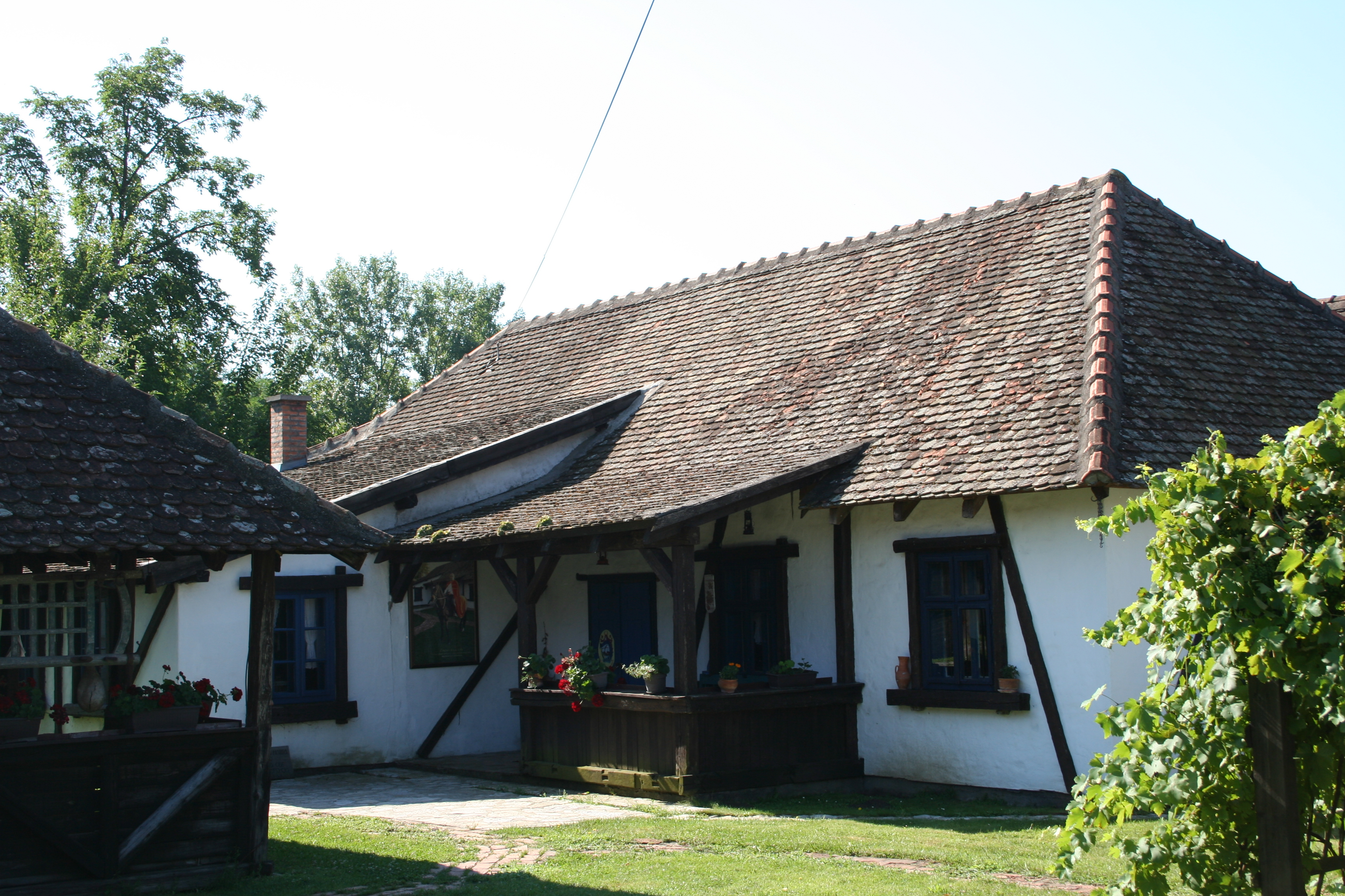 Etno park Avlija, Glušci